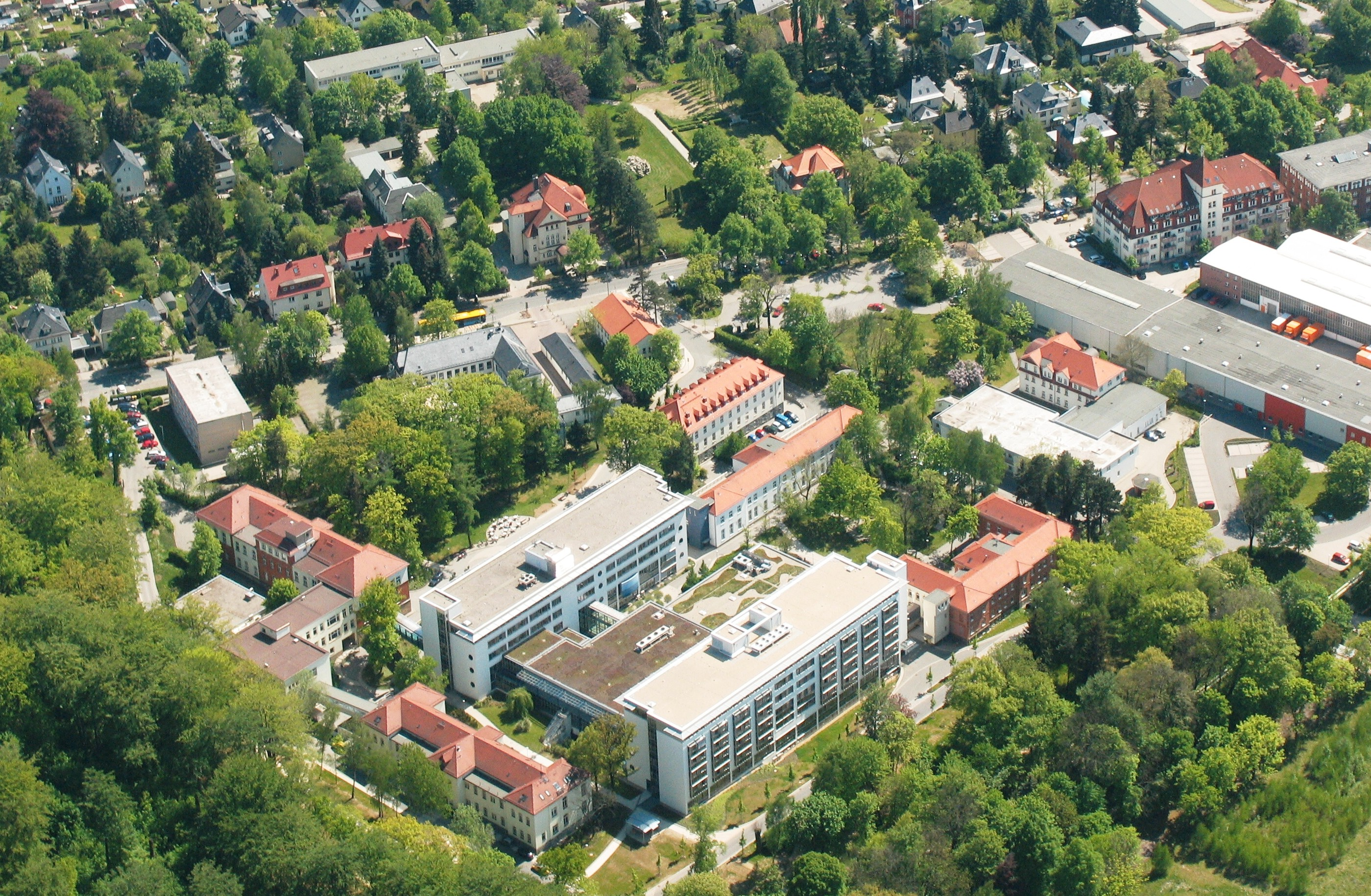 Zeisigwaldkliniken Bethanien Chemnitz